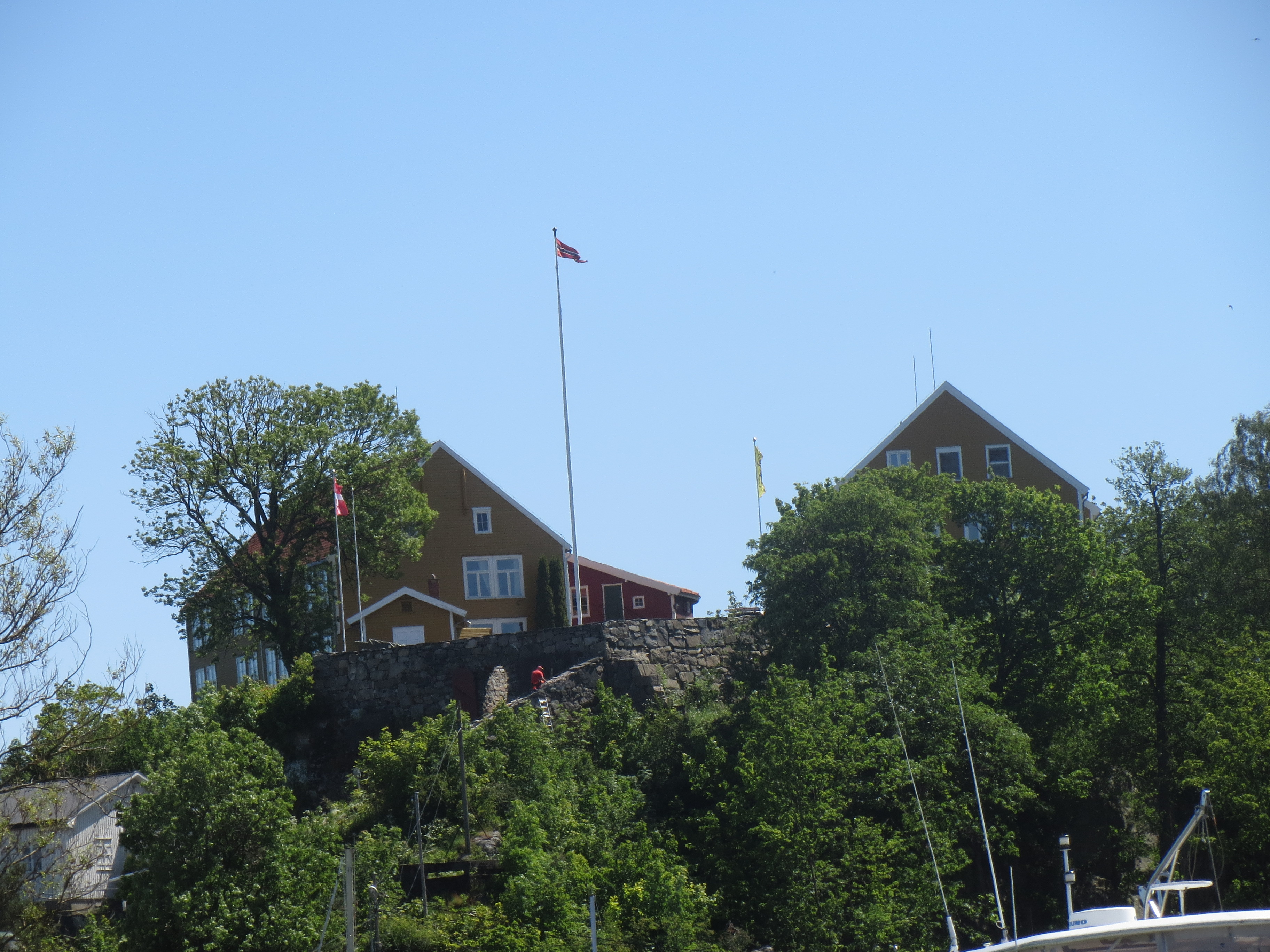 Lasaretthøyden på Odderøya i Kristiansand. Historisk har det vært festningsverk og pestlasarett